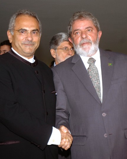 East Timor President José Ramos Horta and Brazilian President Luiz Inácio Lula da Silva